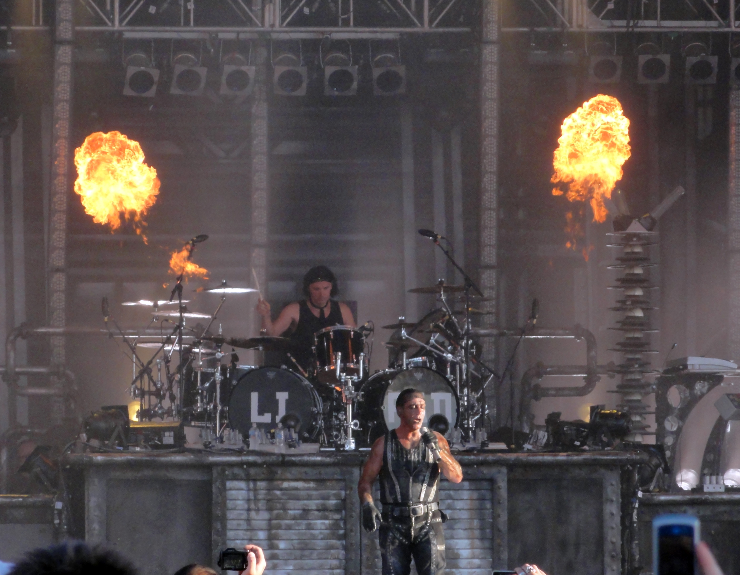 Rammstein